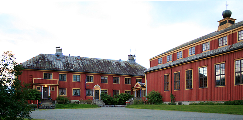 Namdal folkehøgskole, Grong, Nord-Trøndelag.